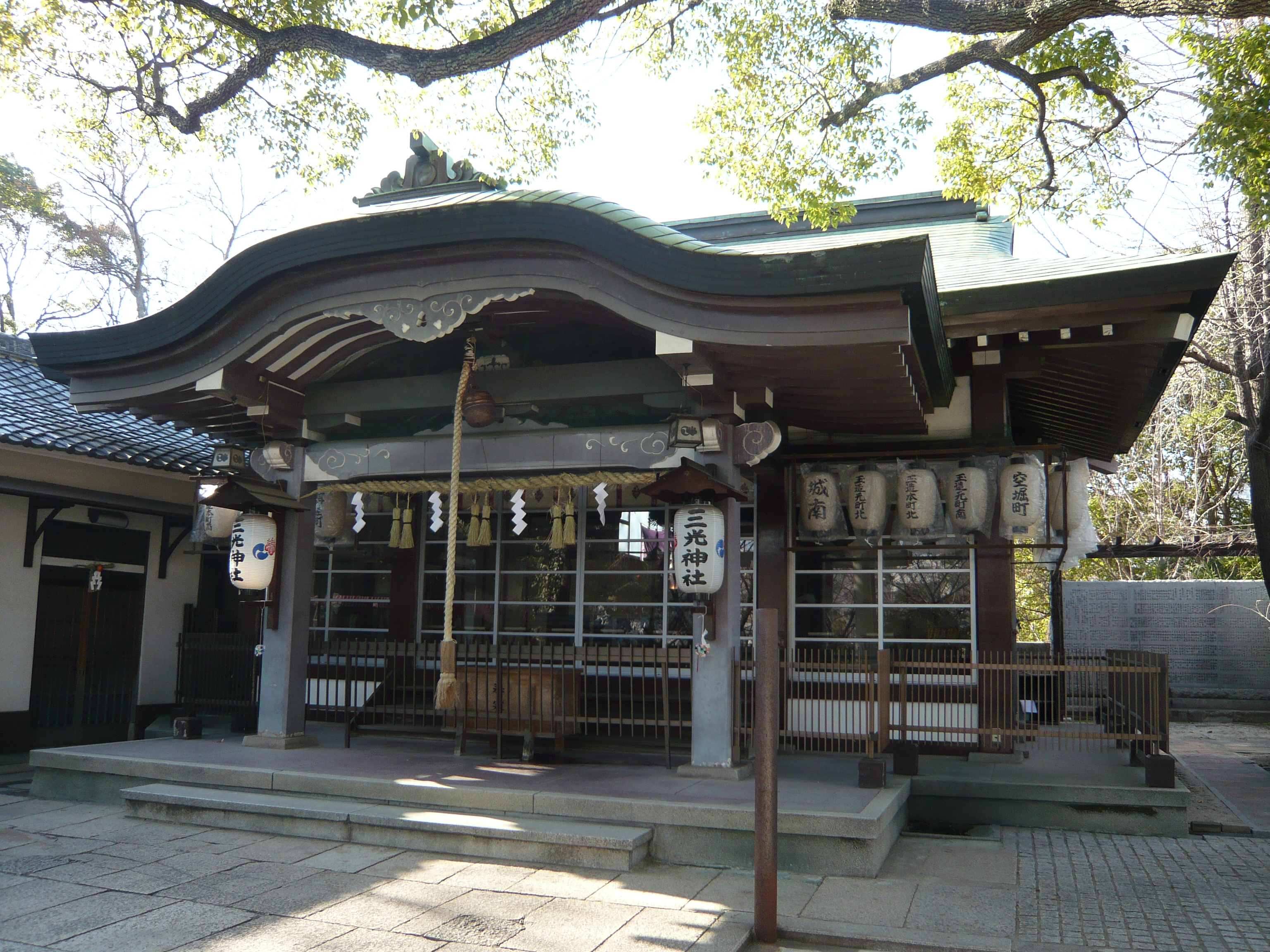 Sankō-jinja, Tennōji, Ōsaka, Ōsaka, Japan 三光神社（大阪市天王寺区）